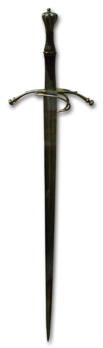 Bastardschwert Museum Schloss Thun / Schweiz